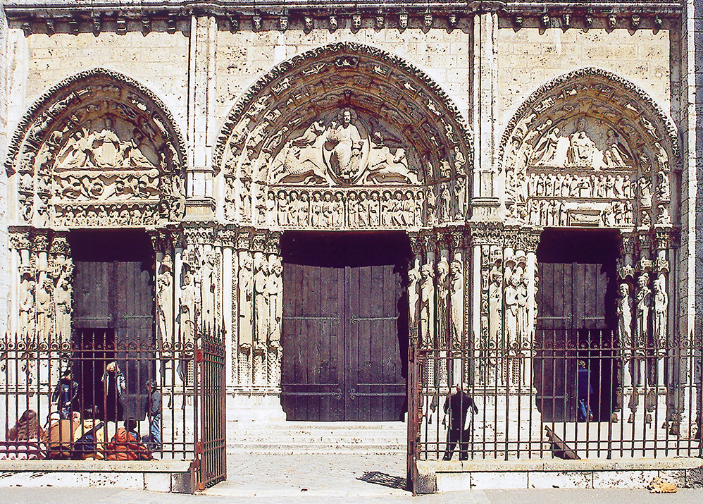 Hauptportal der Kathedrale von Chartres, Frankreich